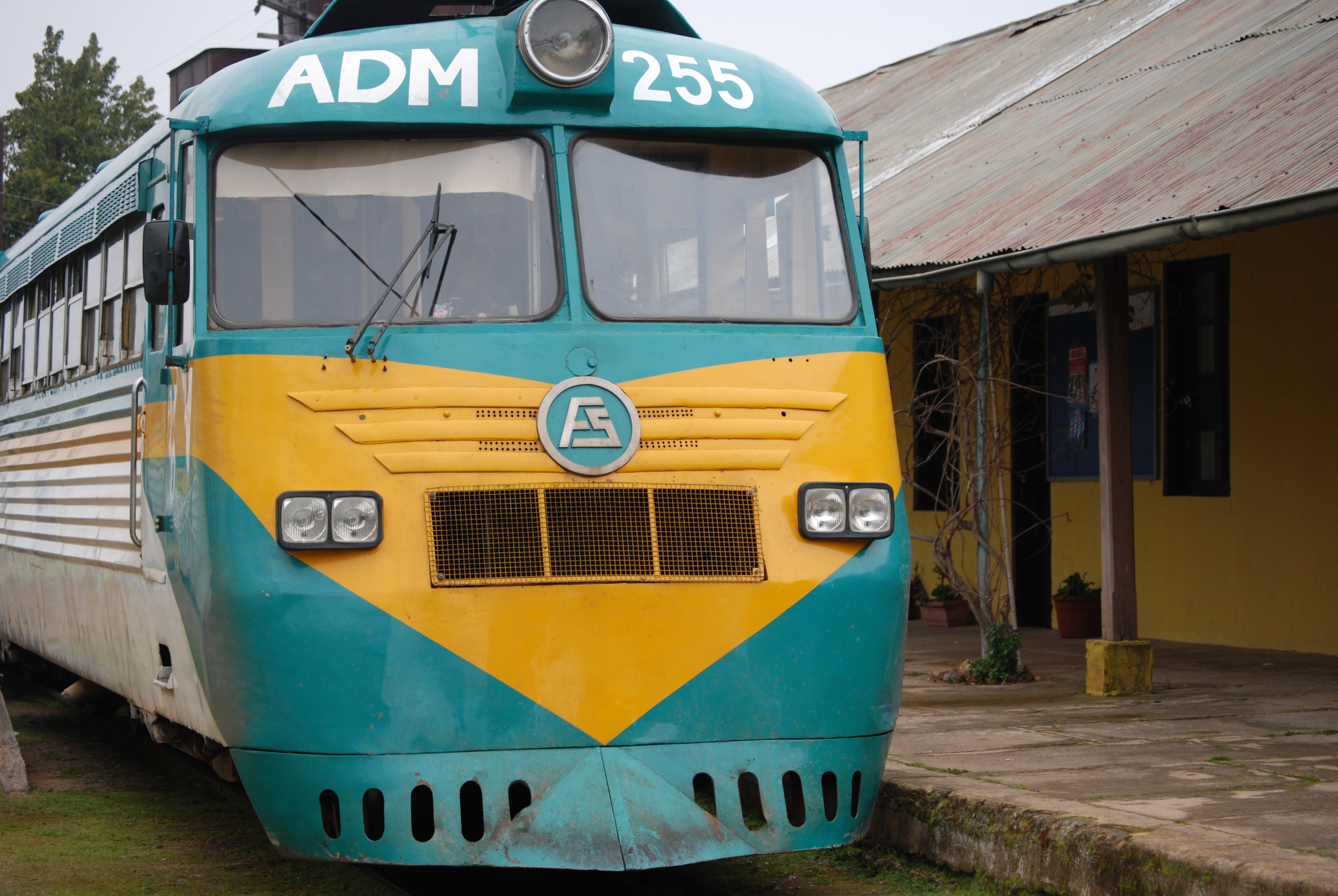 Ramal ferroviario Talca-Constitución. El ramal toma su primera parada formal en gonzalez bastias. le digo parada formal ya que cualquier persona puede parar el ramal durante su trayecto con el dedo y subirse a el, se le podría comparar a una micro. This is a photo of a national monument in Chile: 2085